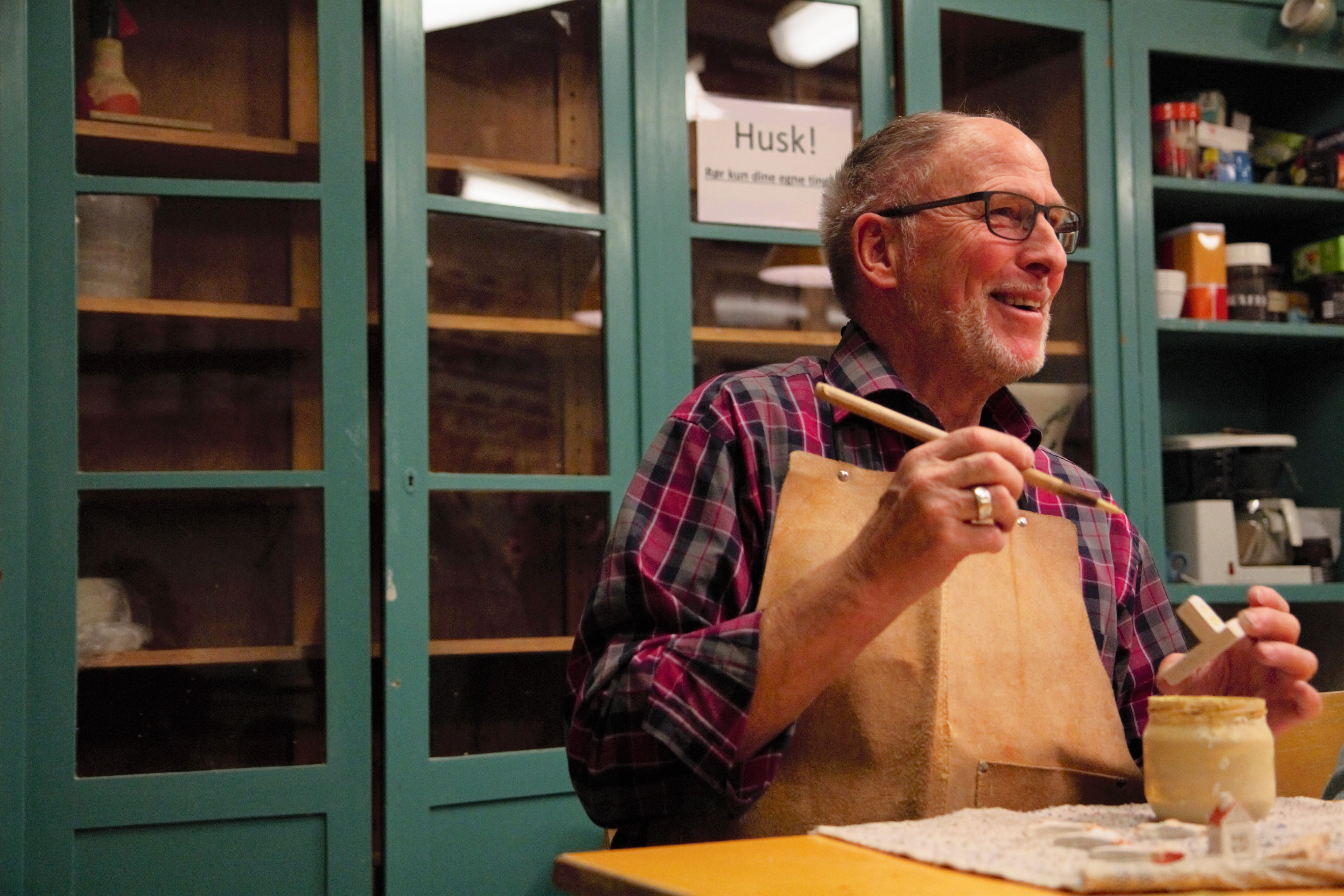 Husflid dækker over mange håndværksfag: trædrejning, broderi, strik, hækling osv.